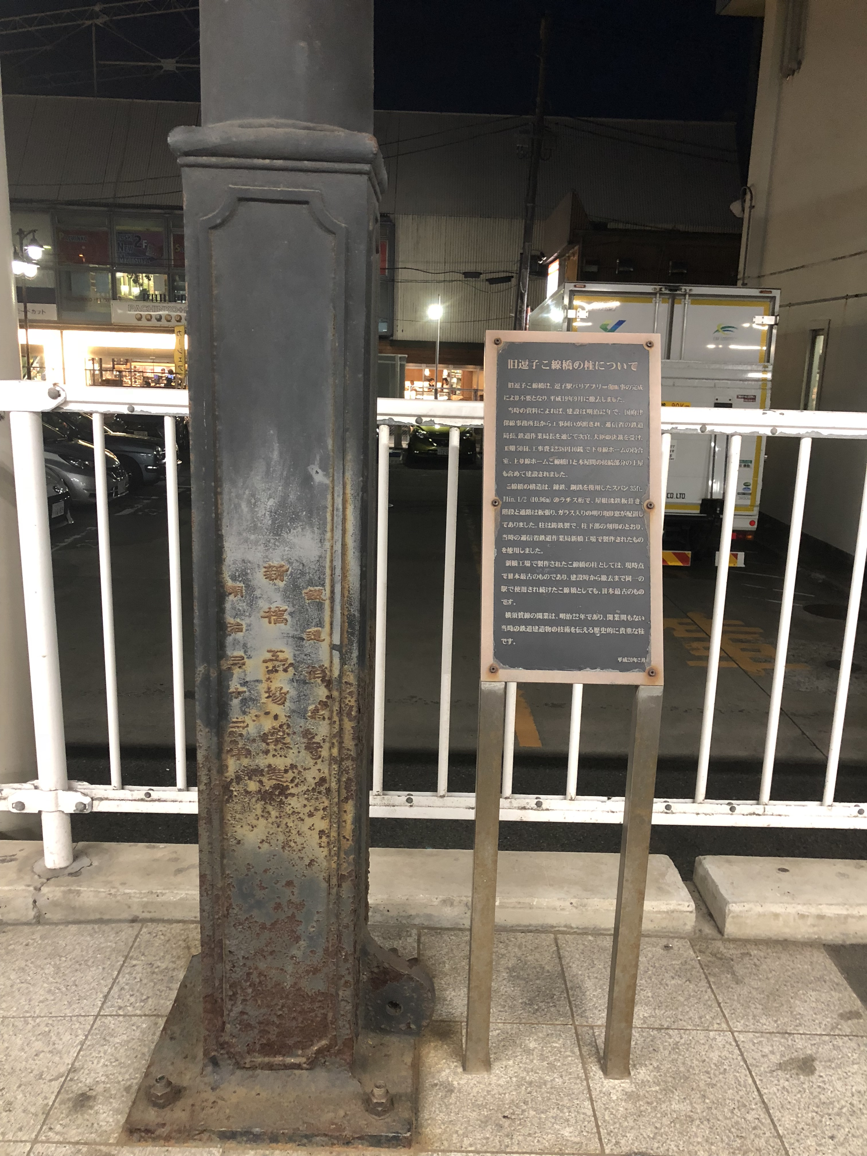 逗子駅内に保存されている旧逗子駅こ線橋の柱（明治32年から平成19年まで使用された）